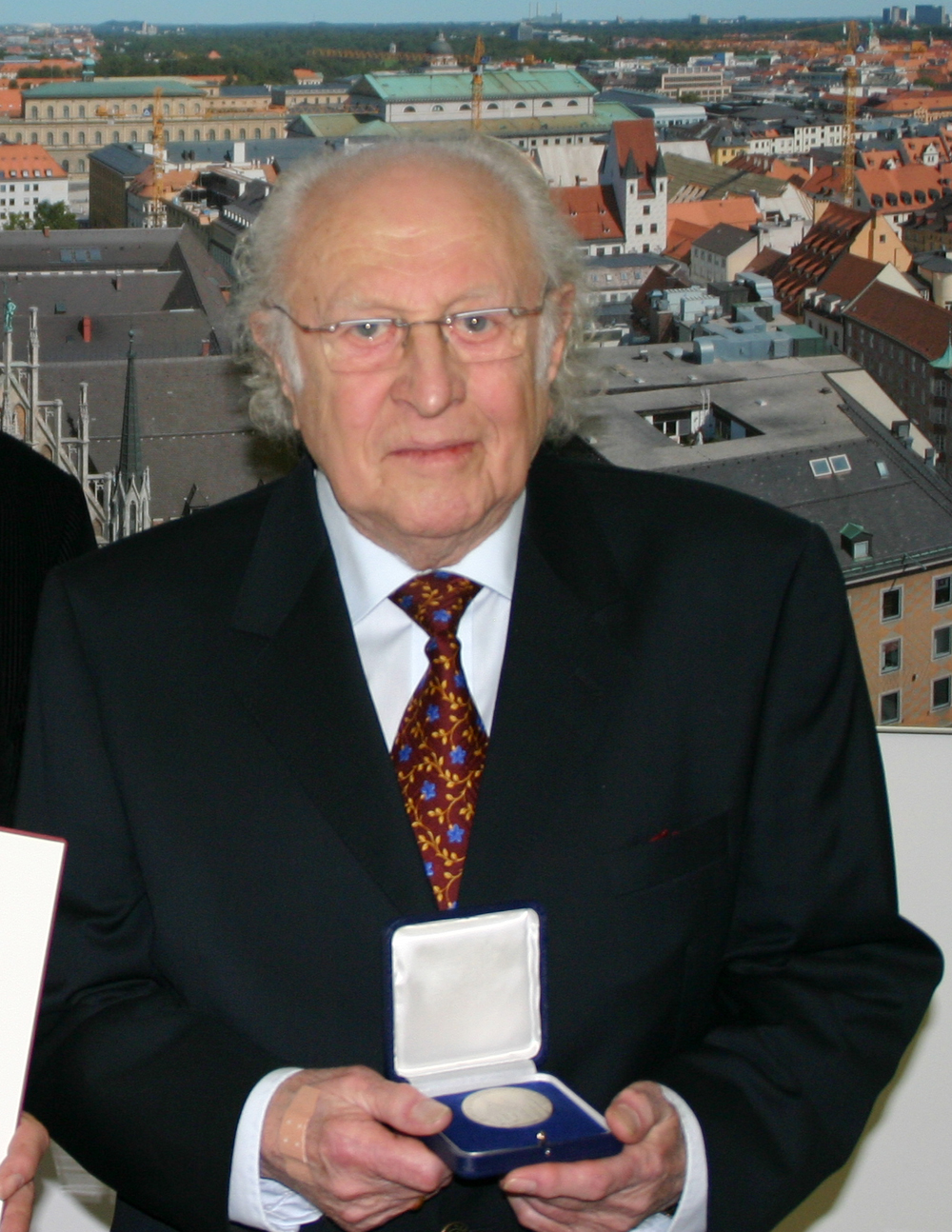 Klaus Peter Schreiner, deutscher Kabarettist und Autor, hat am 16.12.2008 die Medaille 'München leuchtet' erhalten. Hier präsentiert er sie unmittelbar nach der Preisverleihung.